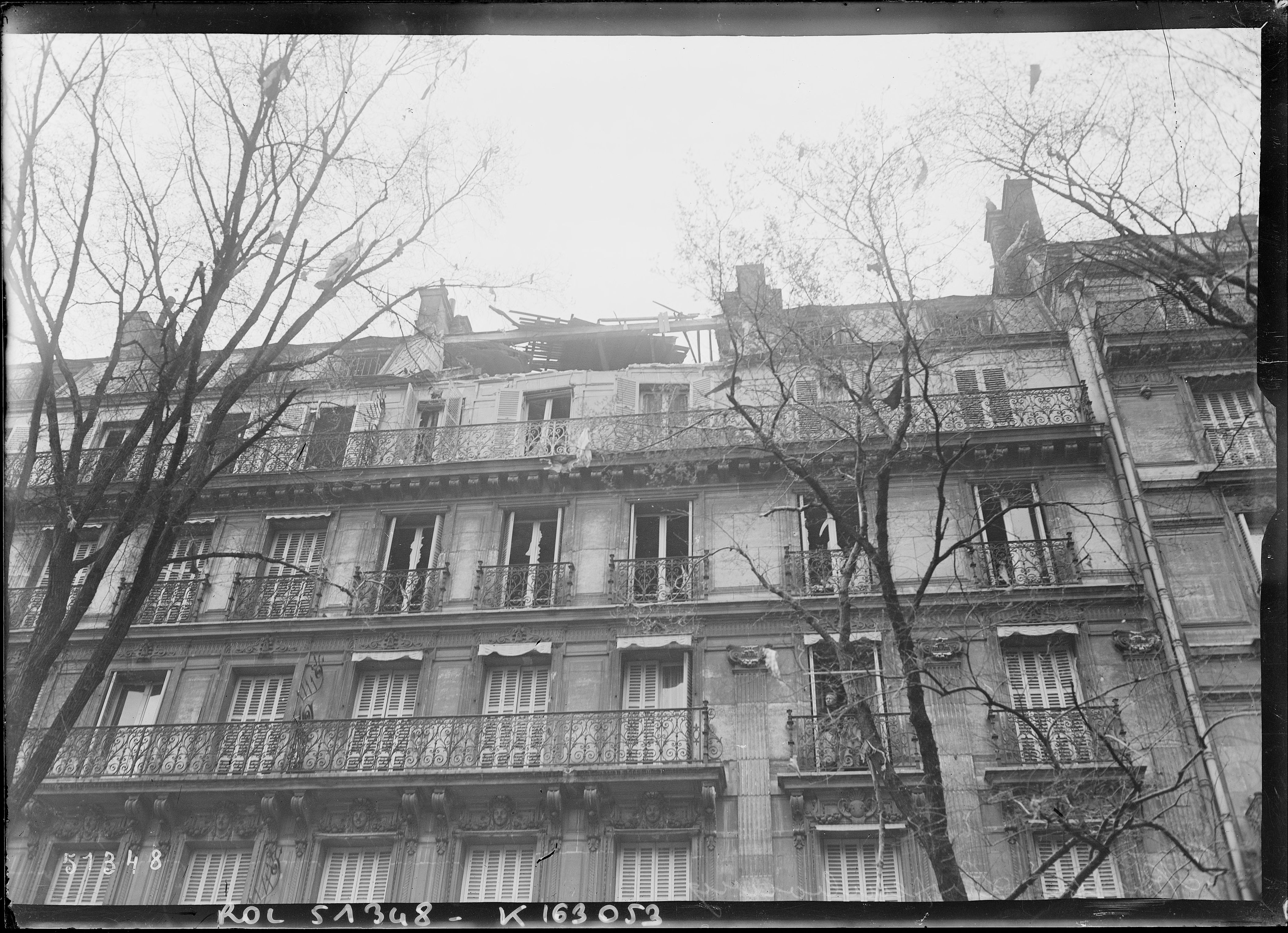 Rue du Luxembourg [Paris, 6e arrondissement, actuelle rue Guynemer], dégâts dûs aux bombardements du 15 juillet 1918 par la Grosse Bertha